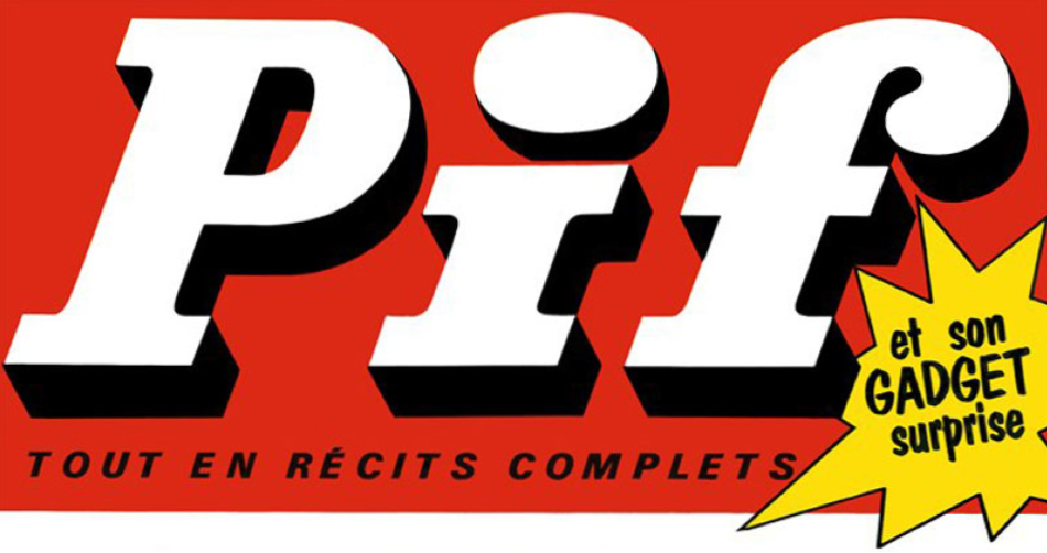 Titre de page du magazine Pif Gadget sur le numéro 1, 24 février 1969.